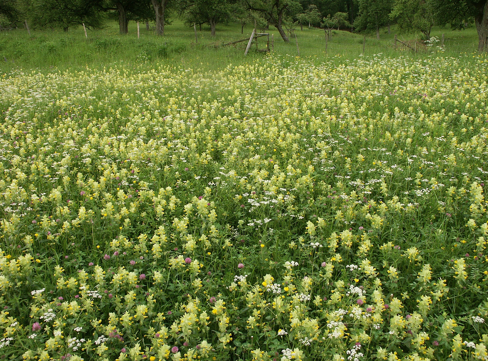 Rhinanthus alectorolophus, habitat - Schwäbisch-Fränkischer Wald, Germany